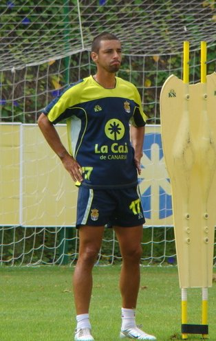 Guayre